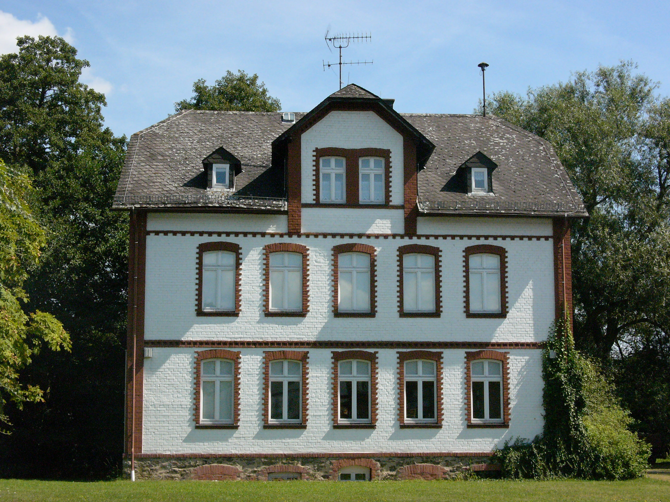 Betriebsgebäude der Hollmann-Werke in Solms-Burgsolms (Lahn-Dill-Kreis, Hessen)